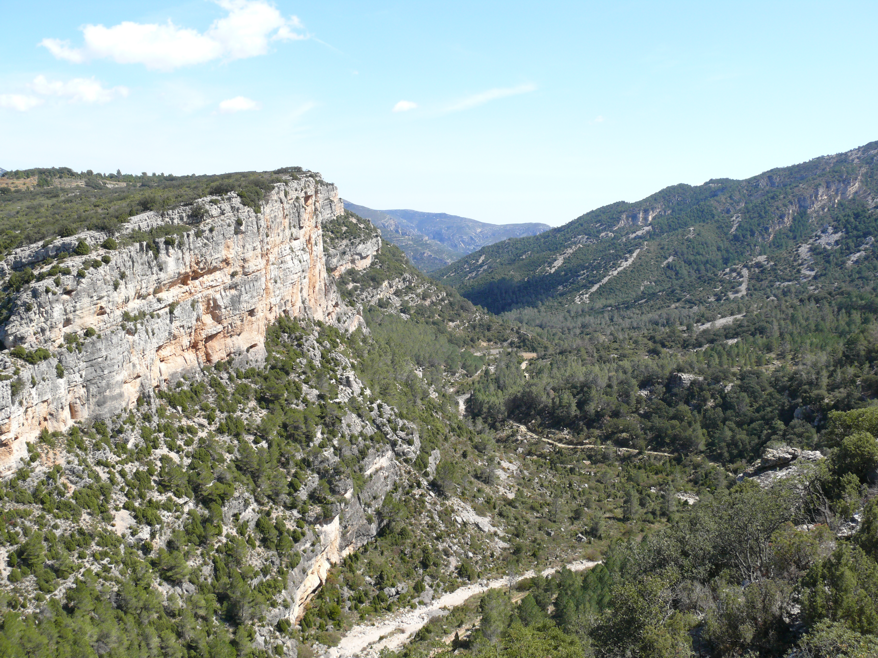 Parc Natural de la Tinença de Benifassà This is a a photo of a natural area in the Land of Valencia, Spain, with id: ES520047